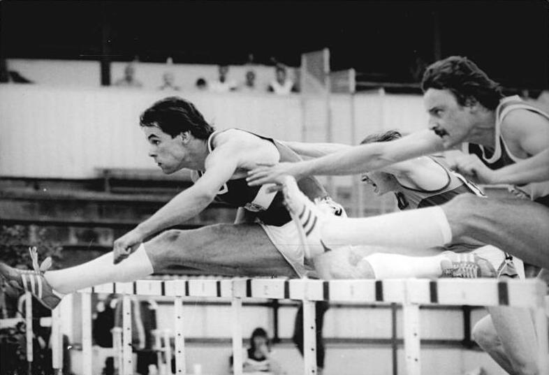 Andreas Schlißke ADN-ZB Demme 1.8.81 Erfurt: DVfL-Sportfest der Leichtathleten-Hürdenlauf- Über 110 m Hürden gewann Andreas Schlißke vom SCK in 13:77. Weiteres siehe hierzu ADN-Meld.